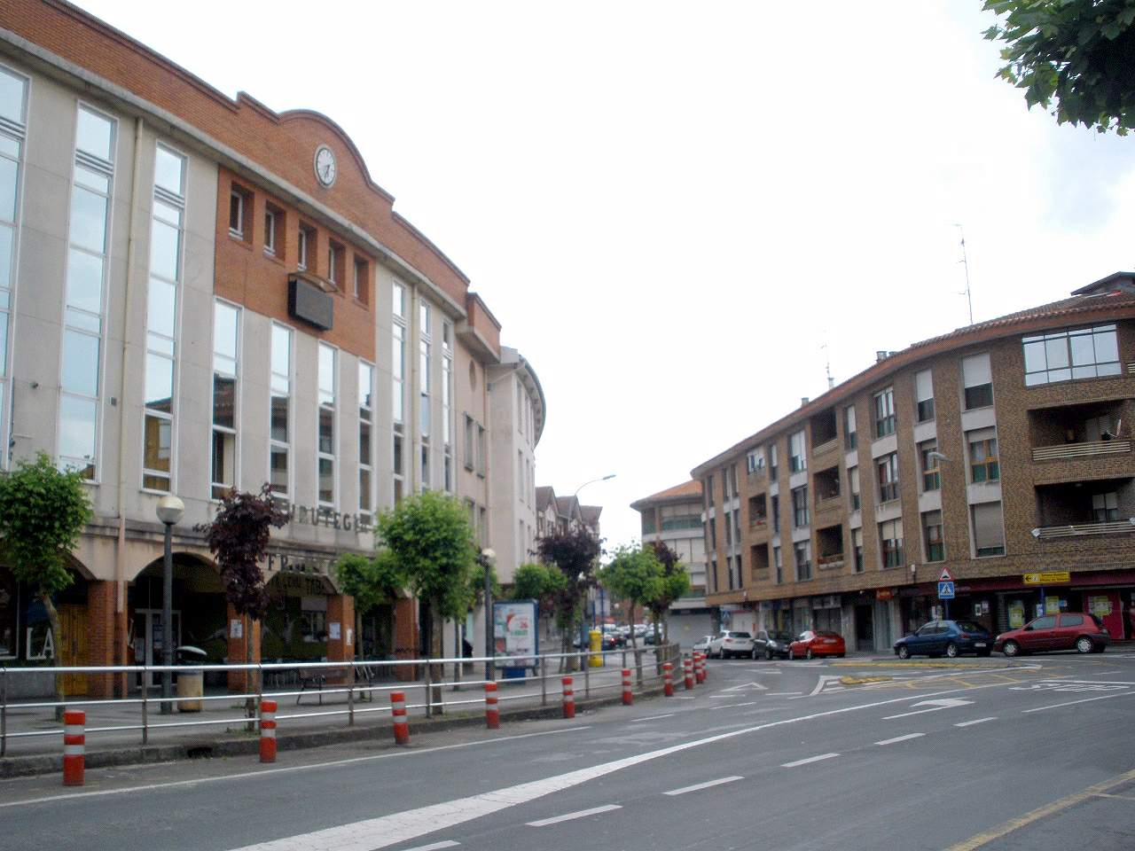 Paisaje urbano de Sopelana, población anodina, pero tranquila y de agradable vivir, en Bizkaia